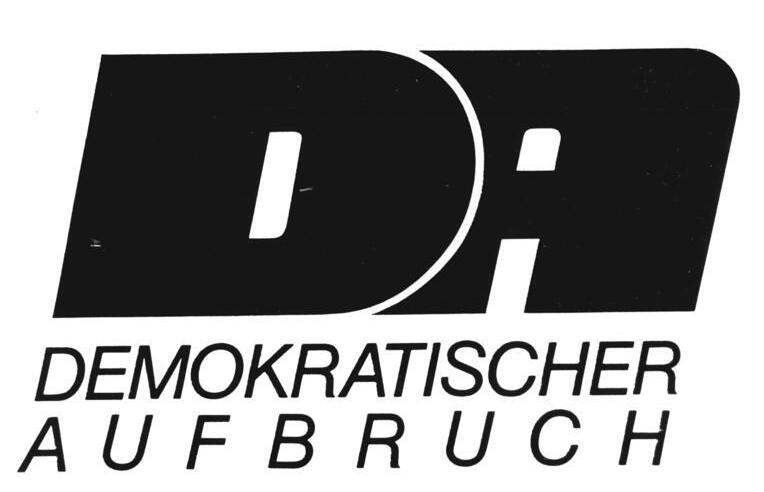 ADN-ZB-Repor-9.2.90-ma-Berlin: Signet von Demokratischer Aufbruch.